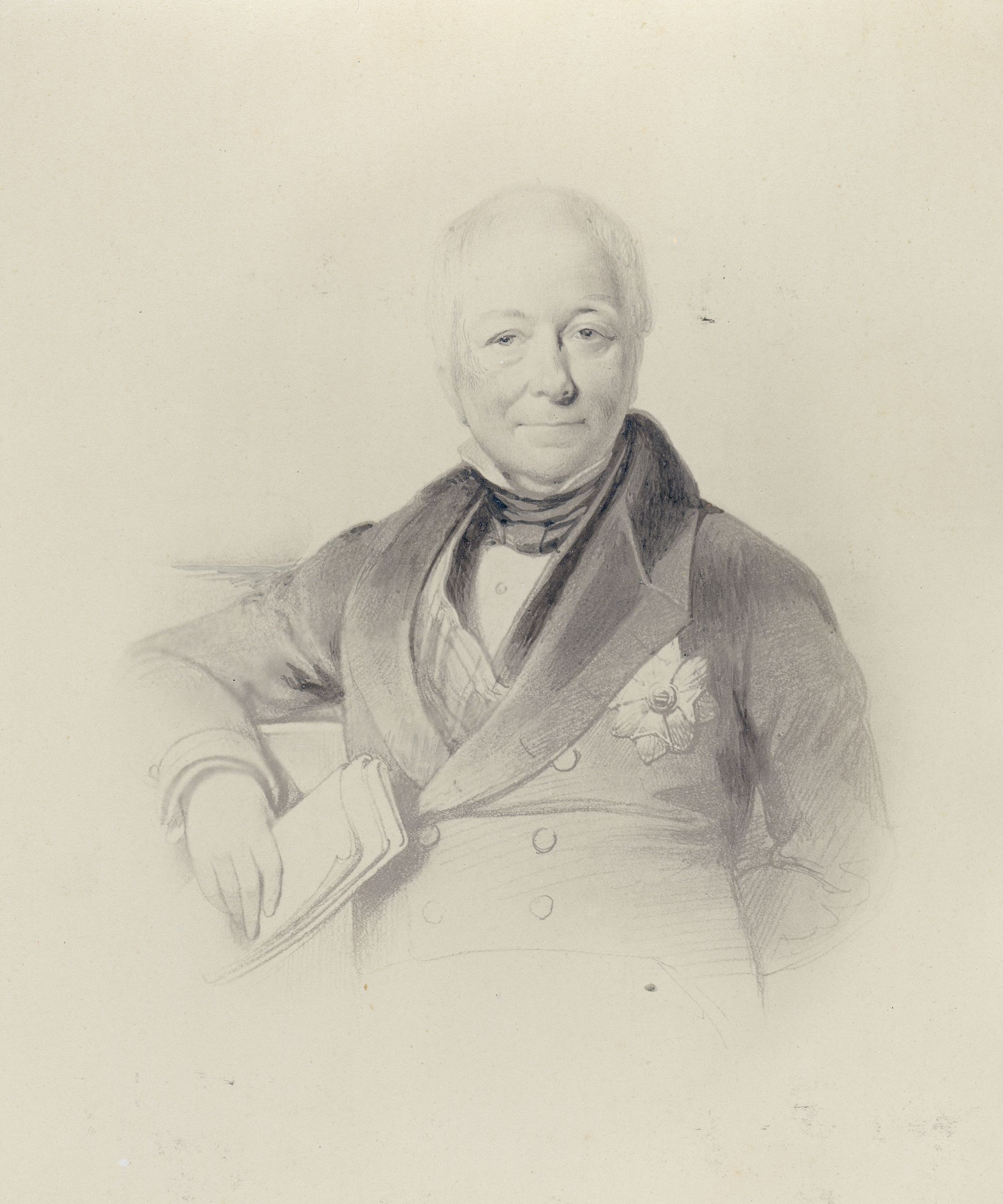 Johan Gijsbert Verstolk van Soelen (1776-1845), préfet du département de la Frise (1810-1813)